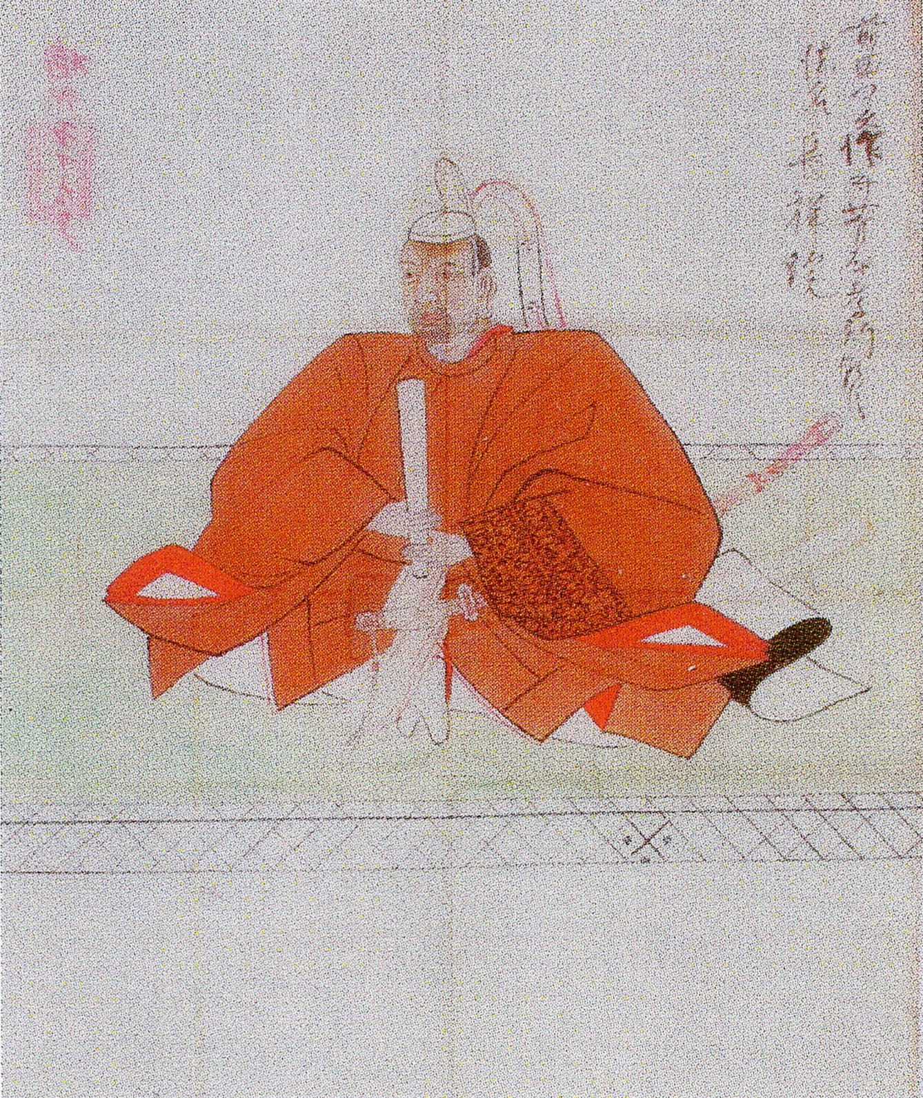 加賀八家前田対馬家5代当主・前田孝行の肖像画粉本。